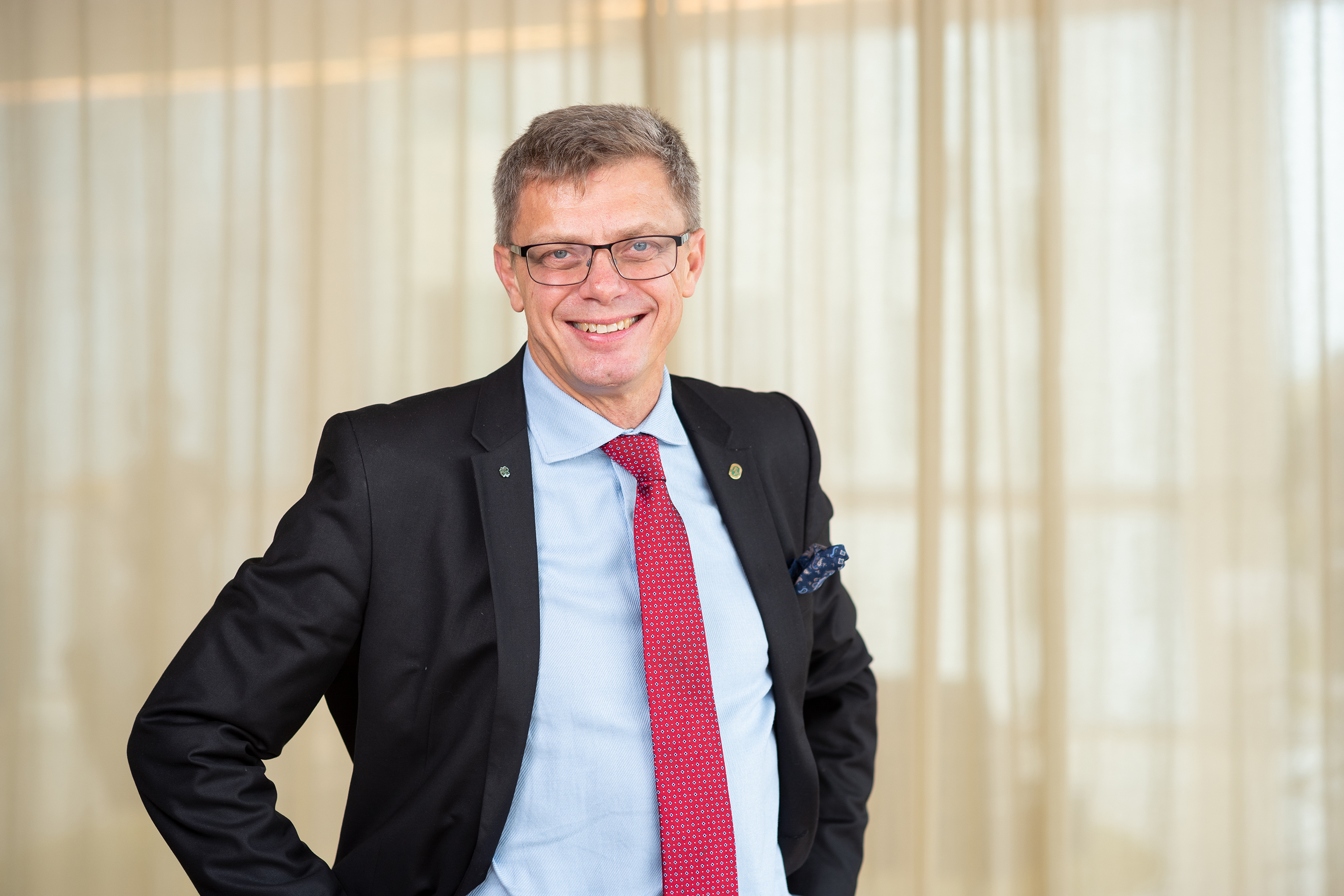 Ola Johansson, Centerpartiet Ola Johansson, riksdagsledamot för Centerpartiet.